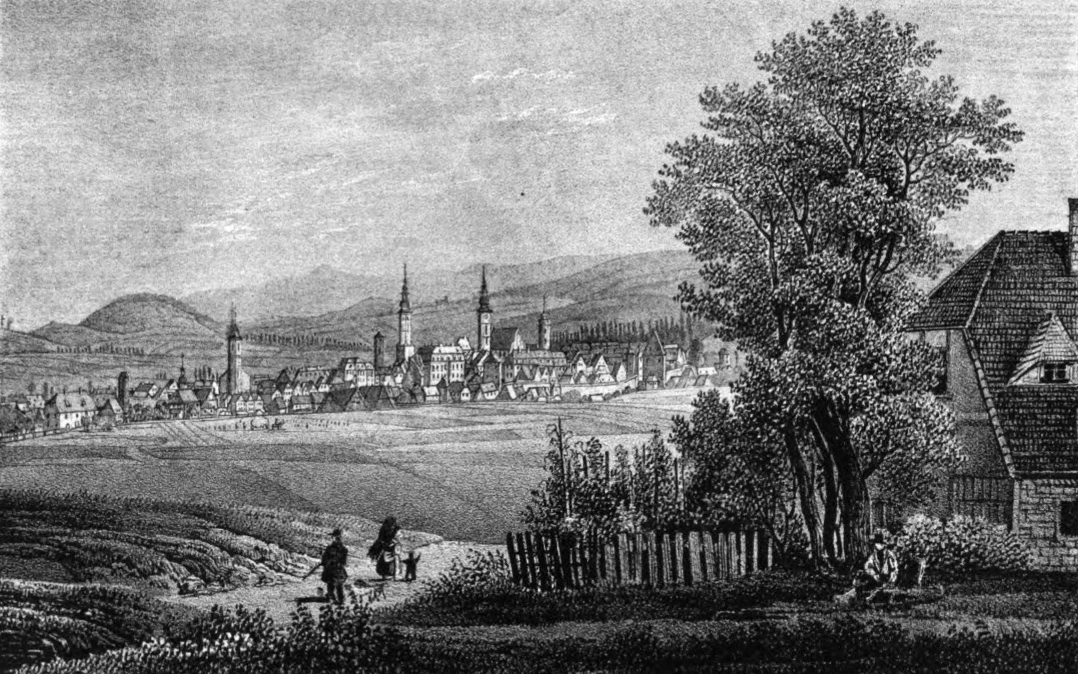 Saxonia Museum für saechsische Vaterlandskunde. Band 2. Dresden: Pietzsch und Comp. Siehe File:Saxonia Museum für saechsische Vaterlandskunde II.djvu